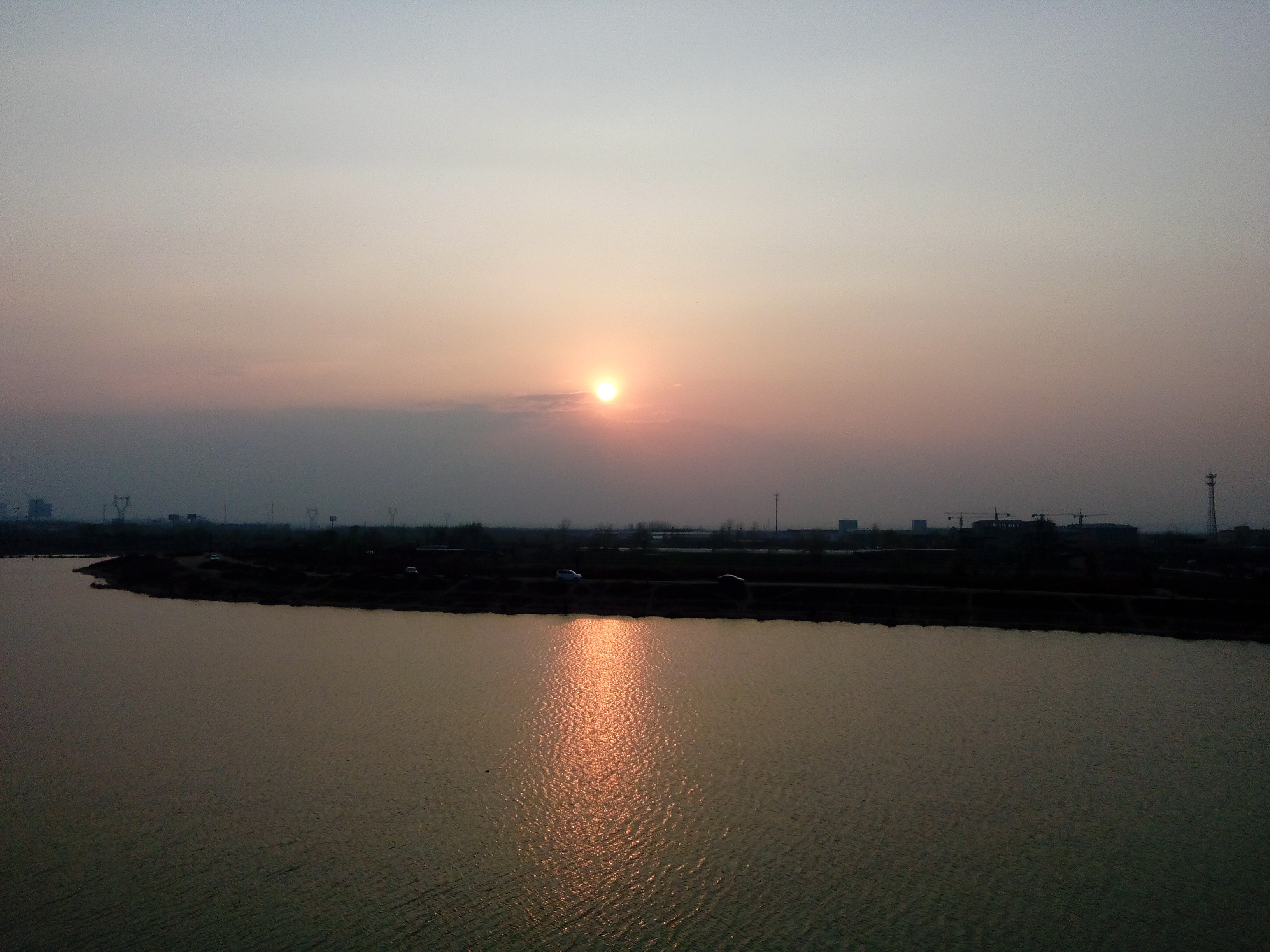 中文（中国大陆）: 邯郸市北湖公园的输元河夕阳景观。